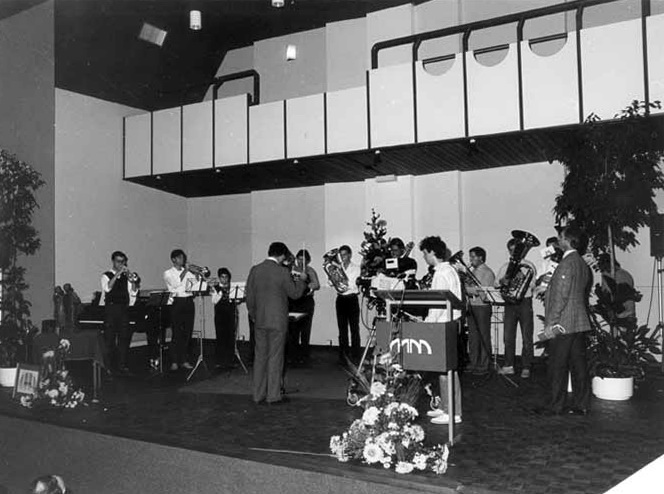 Opening van de Stedelijke Muziekschool (later Kumulus) in het voormalige Klooster van de Zusters Franciscanessen van Heythuysen in Maastricht in 1983. Fotocollectie RHCL Maastricht, GAM 1064.